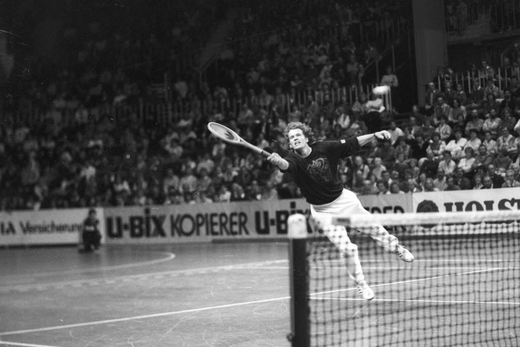 Tennisspiel mit Davis-Cup-Spieler Michael Westphal.